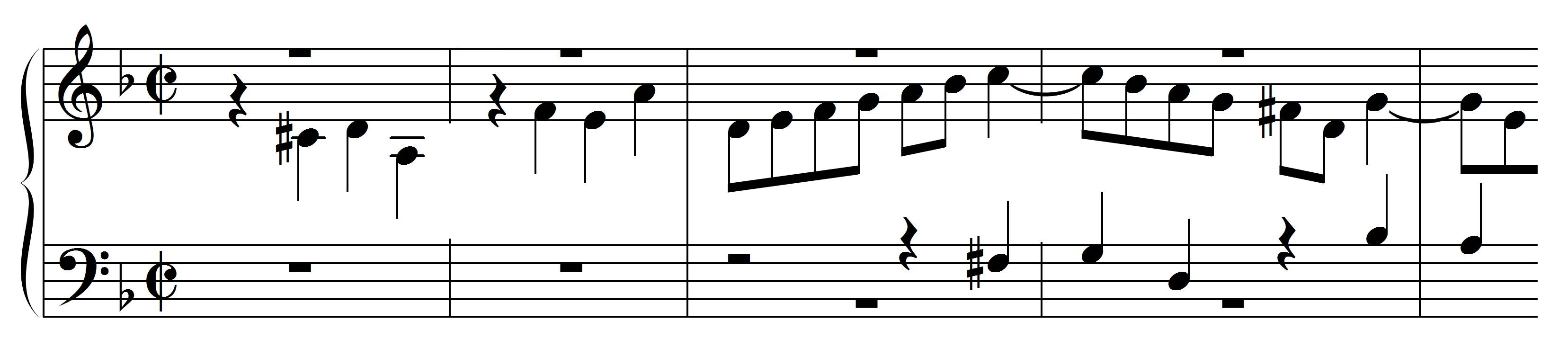 Bach, JS, Incipit Contrapunctus 10, BWV 1080